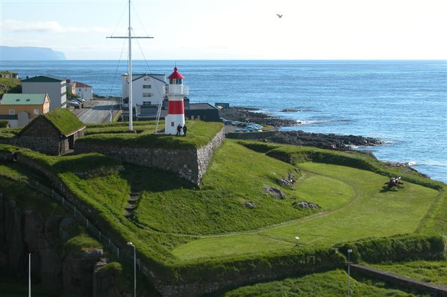 Skansin in Tórshavn, Faroe Islands